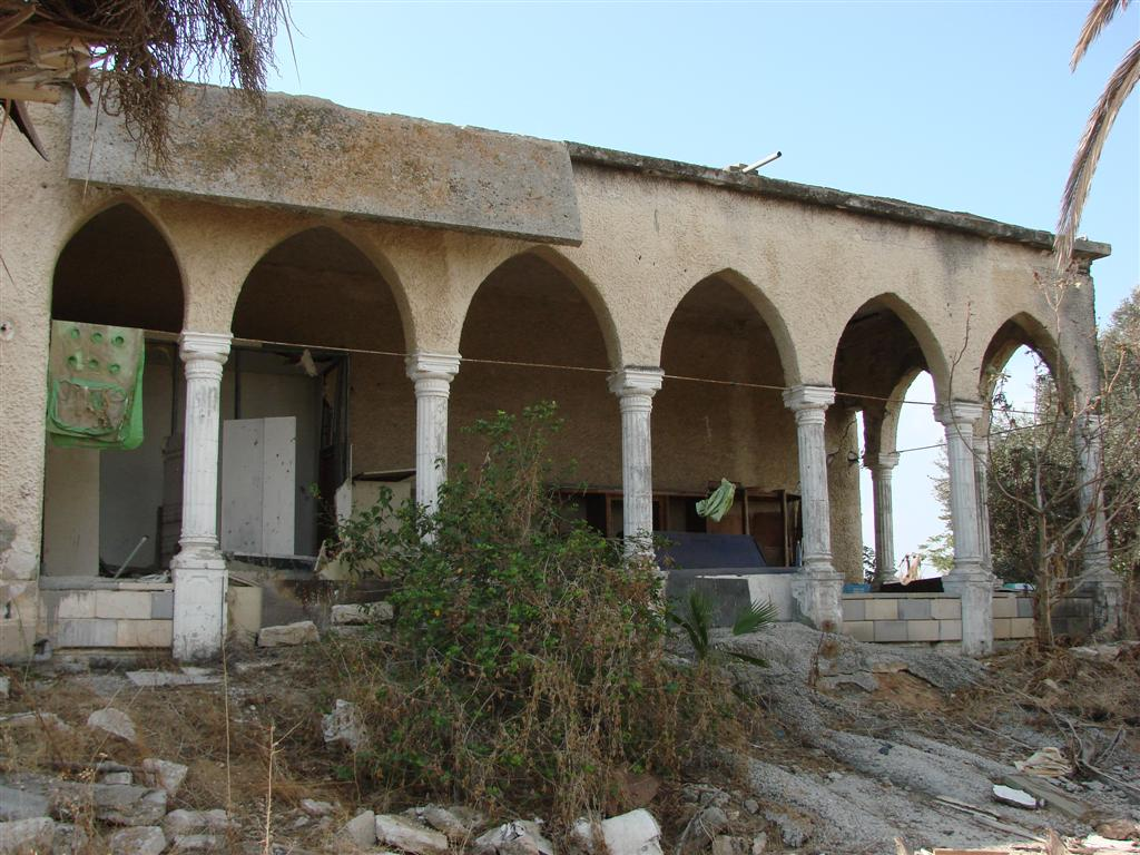 כפר קוביבה - כפר גבירול - רחובות